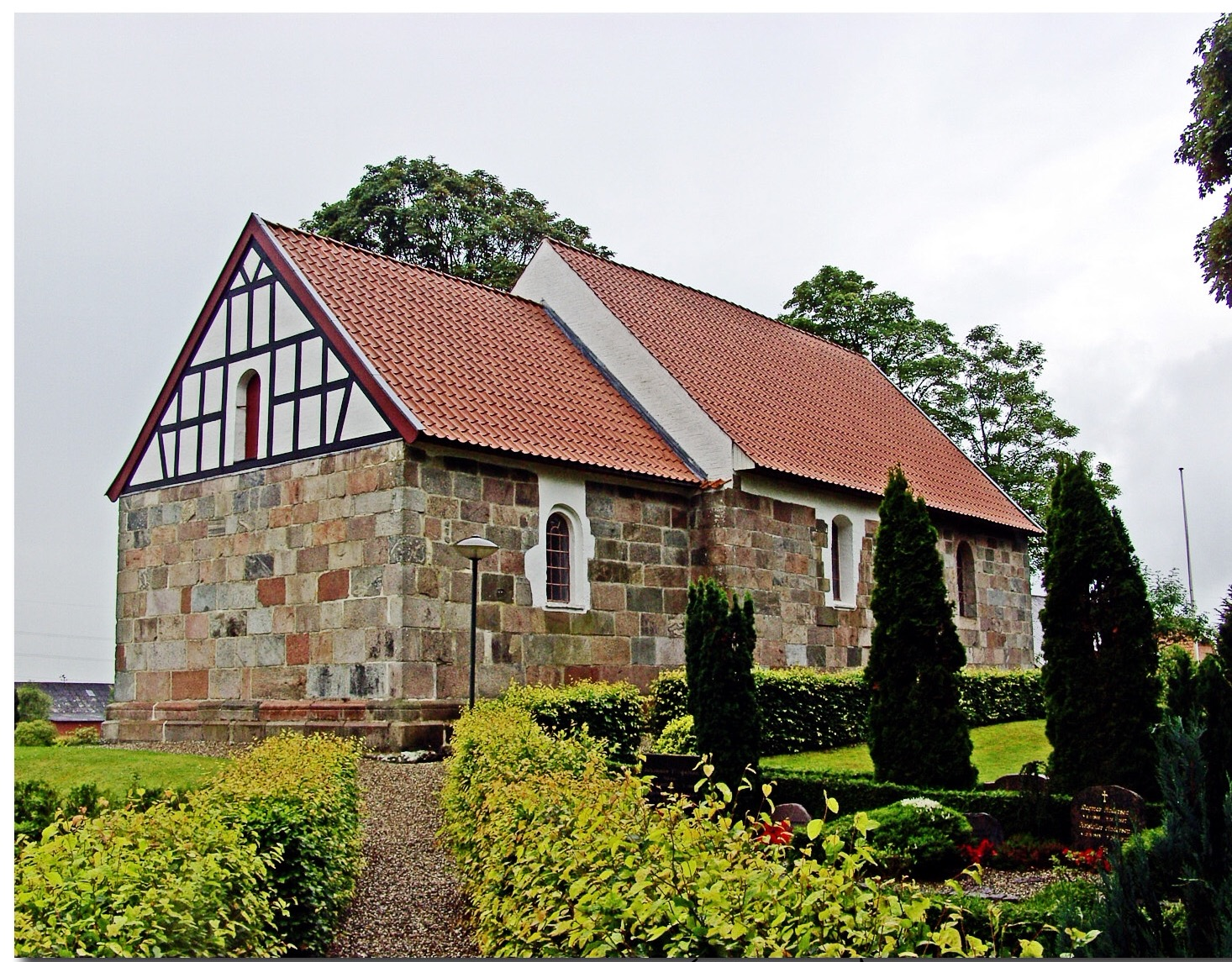 Lysgård Kirke set fra nordøst